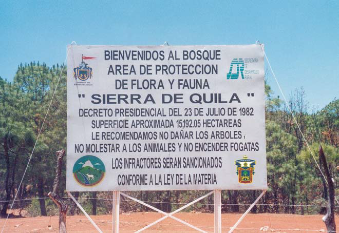 entrada a la area de protección de flora y fauna